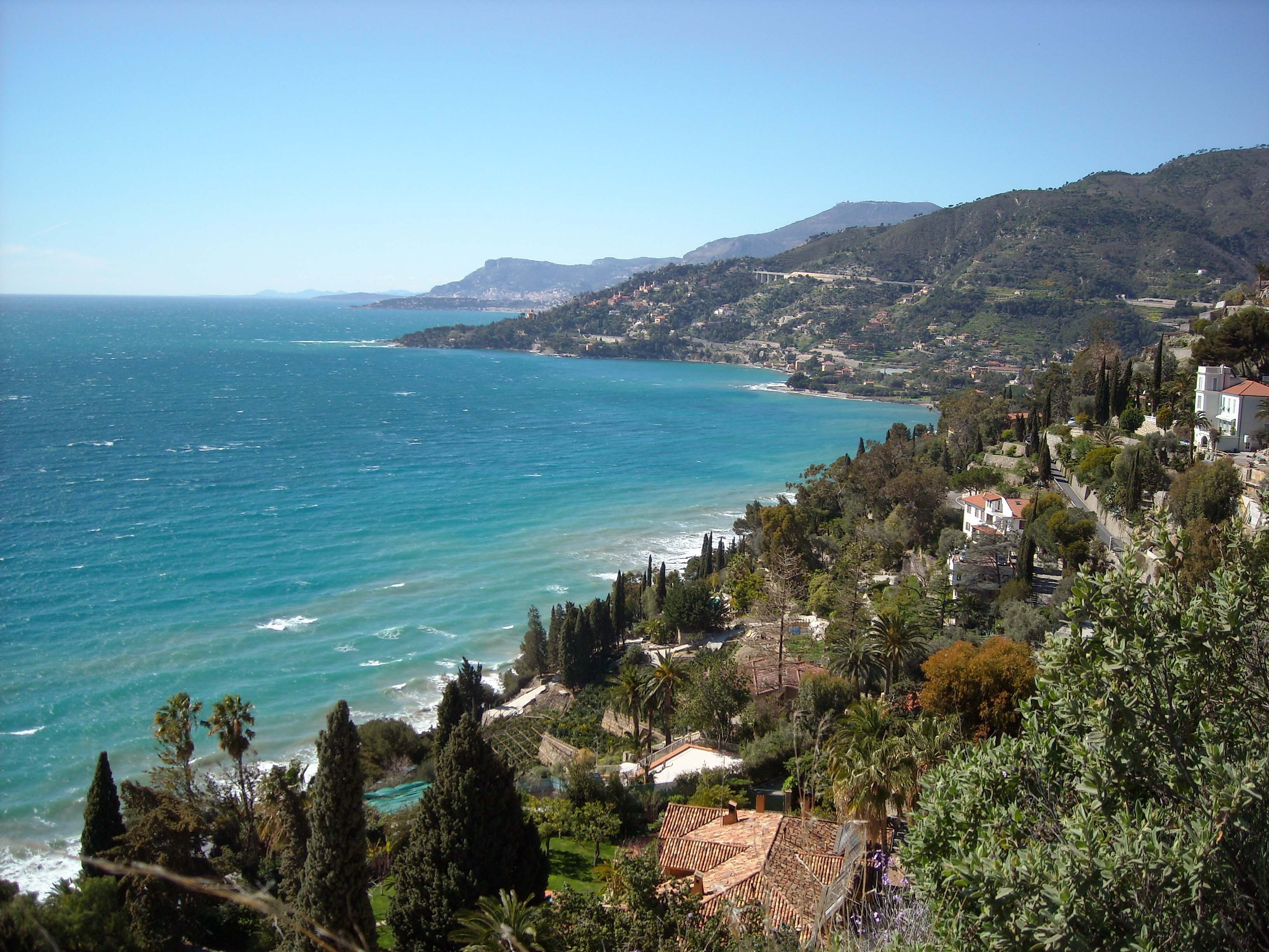 La Piana di Latte a Ventimiglia nella provincia di Imperia in Liguria, Italia.